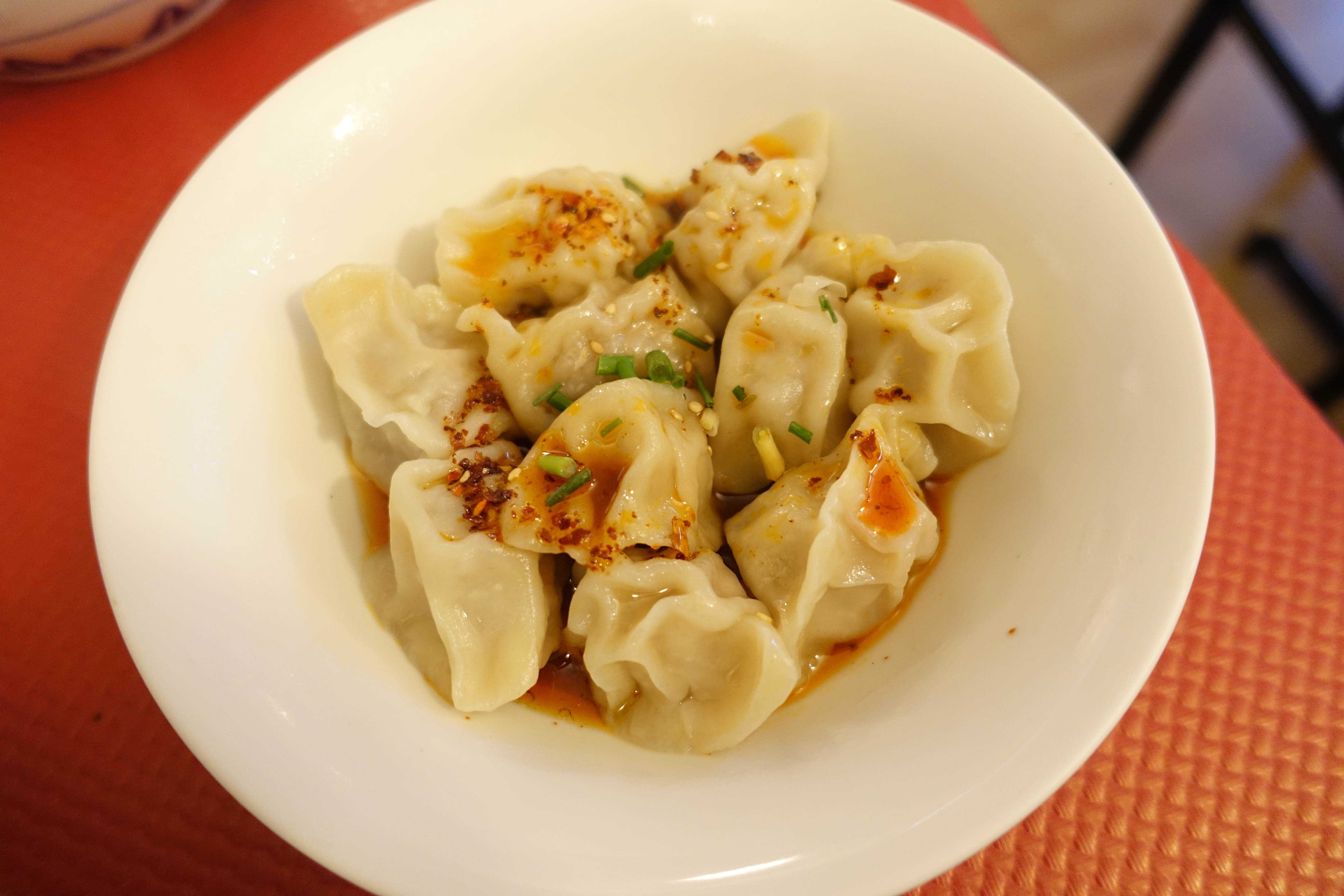 Chengdu dumplings @ Saveurs de Chengdu @ Paris